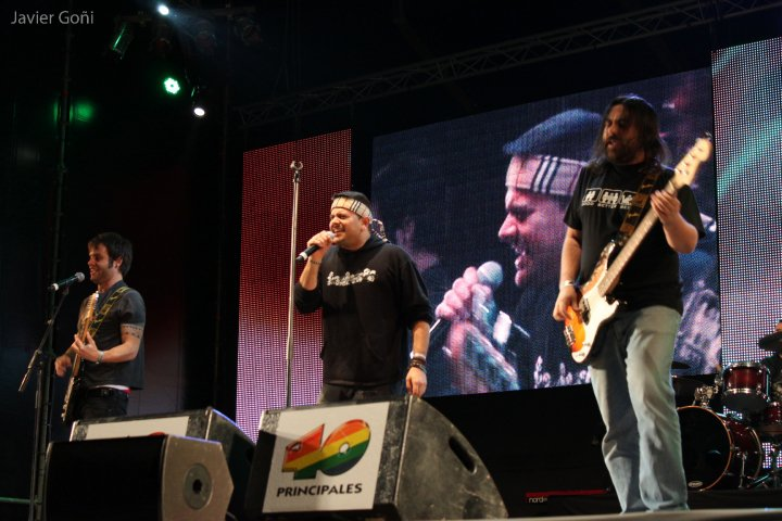 Despistaos actuando en el Primavera Pop 2010 en Barcelona.